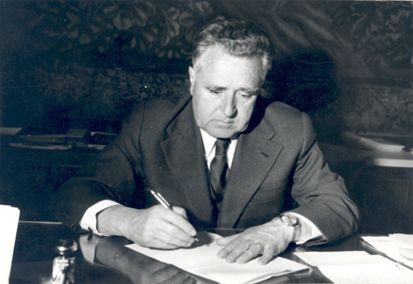 Martín Almagro Basch. Número de inventario: FD00334.